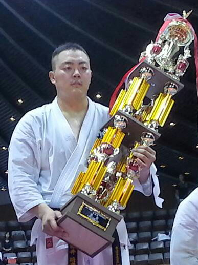 藤井将貴優勝時